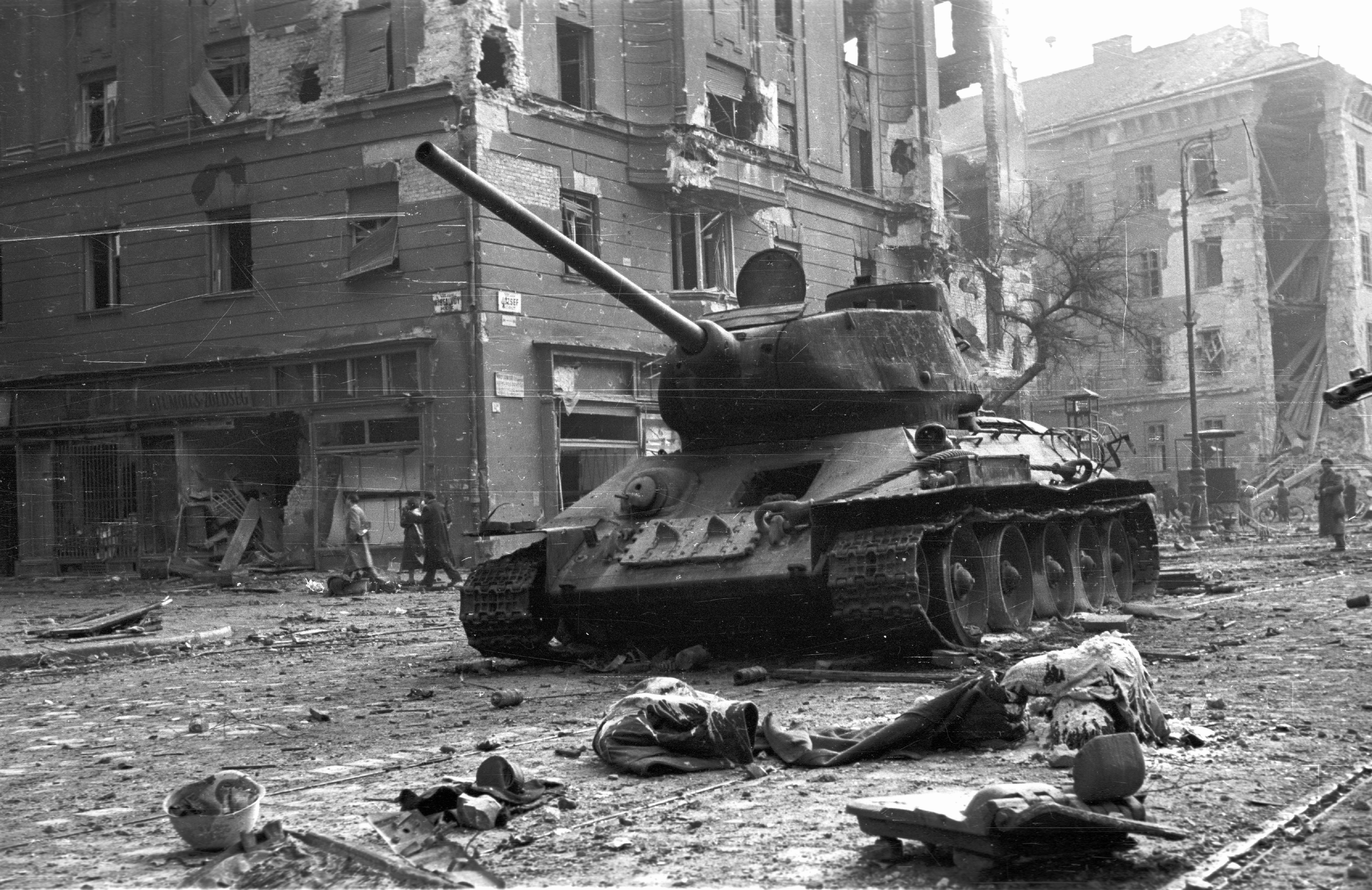 József körút - Corvin (Kisfaludy) köz sarok, háttérben a Kilián laktanya romos épülete. Kiégett szovjet T-34/85 harckocsi. Location: Hungary, Budapest VIII. Tags: wreck, Soviet brand, tank, revolution, corpse, war damage, Budapest Title: József körút - Corvin (Kisfaludy) köz sarok, háttérben a Kilián laktanya romos épülete. Kiégett szovjet T-34/85 harckocsi.